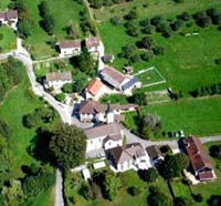 Le village vu du ciel